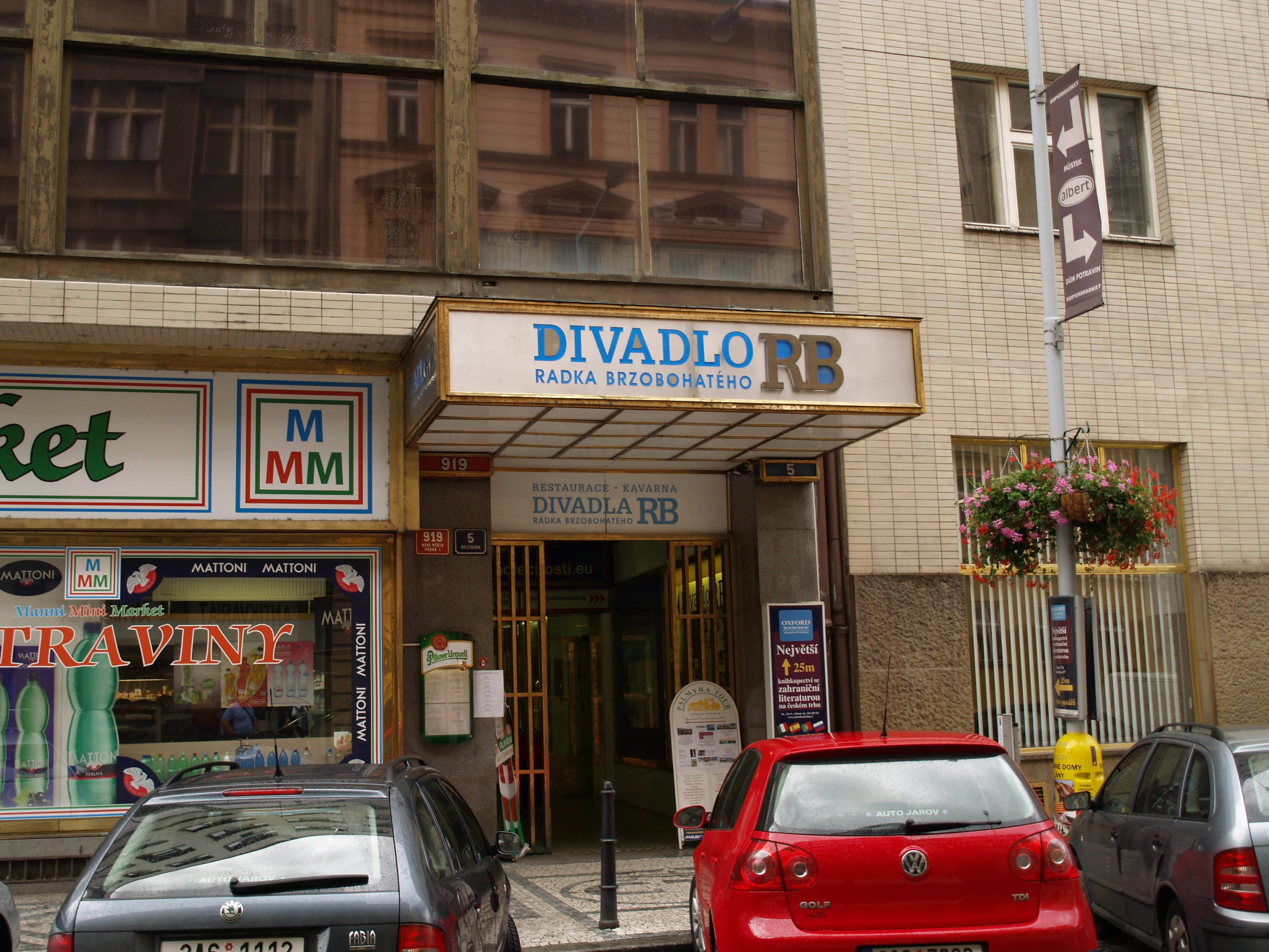 Opletalova 5 (č. p. 919) – vstup do pasáže ČTK, kde sídlí Divadlo Radka Brzobohatého (v prostorách bývalého Divadla Hudby)